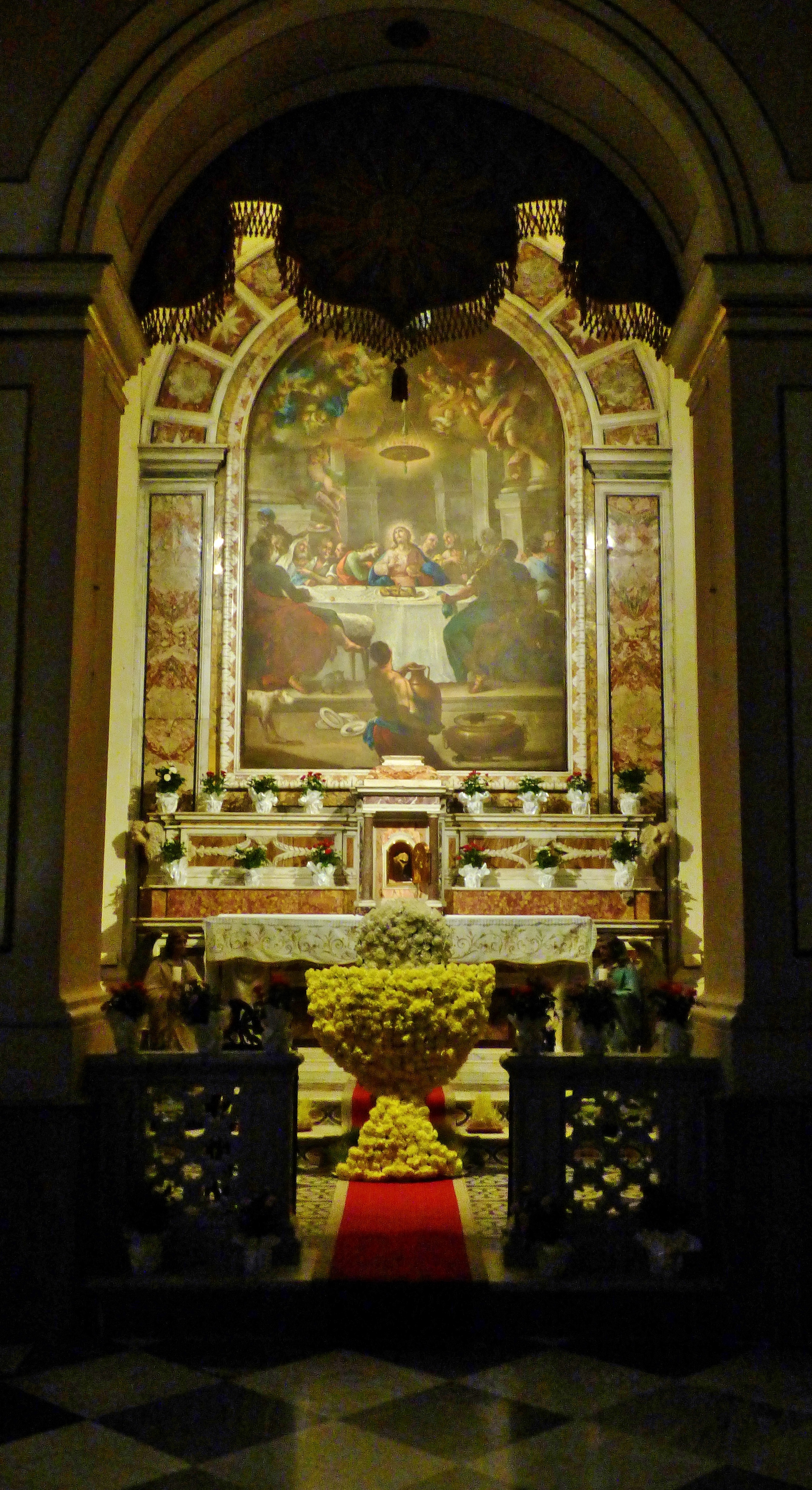 Cappella dedicata al Santissimo Sacramento nella Collegiata Santissima Maria Assunta di Ceglie Messapica (BR), navata destra